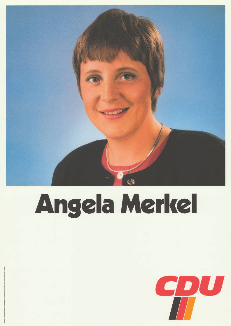 Angela Merkel CDUAbbildung:PorträtfotoPlakatart:Kandidaten-/Personenplakat mit PorträtAuftraggeber:CDU-Bundesgeschäftsstelle, Hauptabteilung Öffentlichkeitsarbeit, Konrad-Adenauer-Haus, BonnDrucker_Druckart_Druckort:Greven & Bechtold, HürthObjekt-Signatur:10-031 : 869Bestand:CDU-Plakate (10-031)GliederungBestand10-18:PersonenplakateLizenz:KAS/ACDP 10-031 : 869 CC-BY-SA 3.0 DE